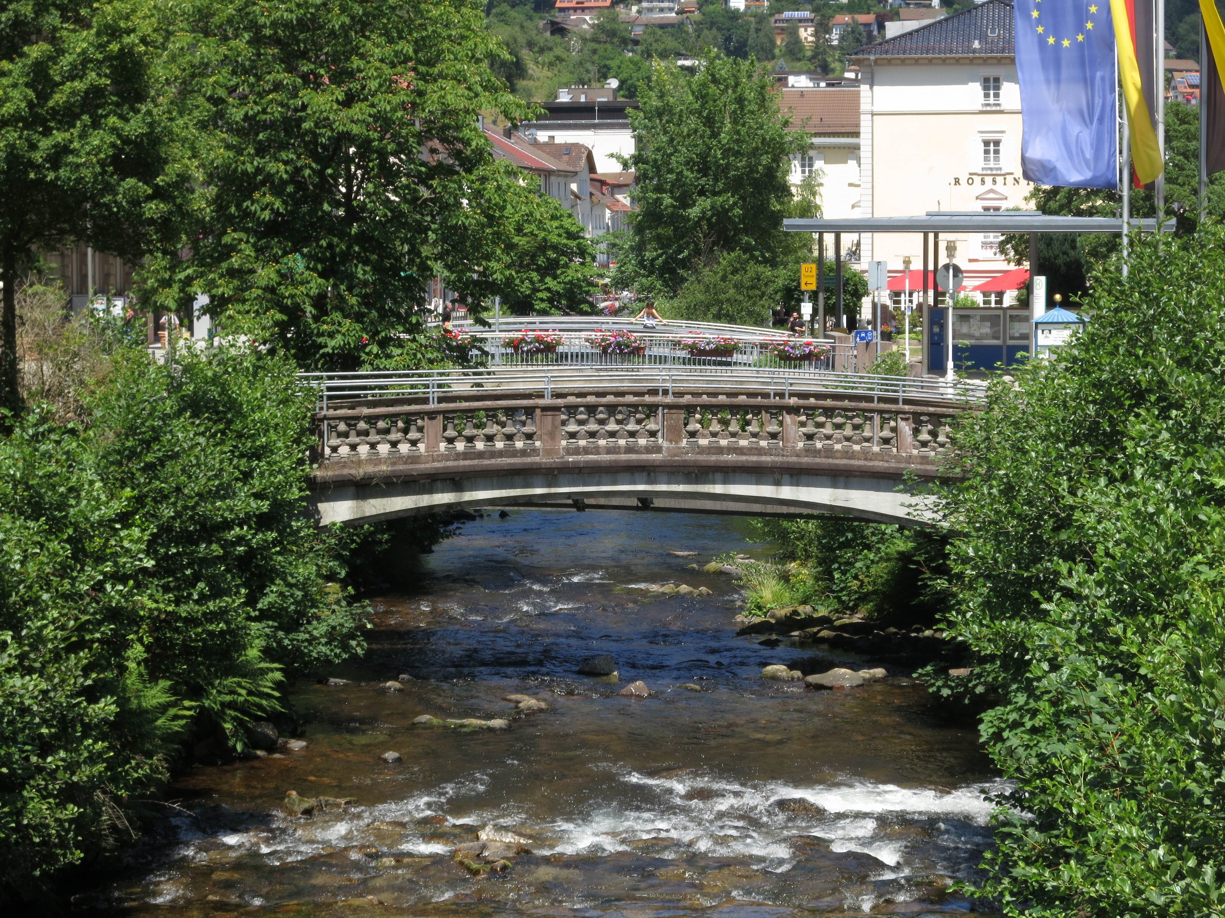 Enzbrücken am Kurplatz Bad Wildbad.